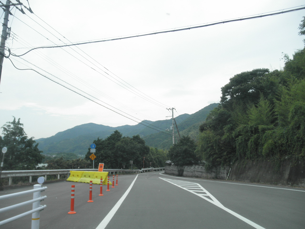 徳島県阿南市楠根町七浦 徳島県道19号阿南鷲敷日和佐線